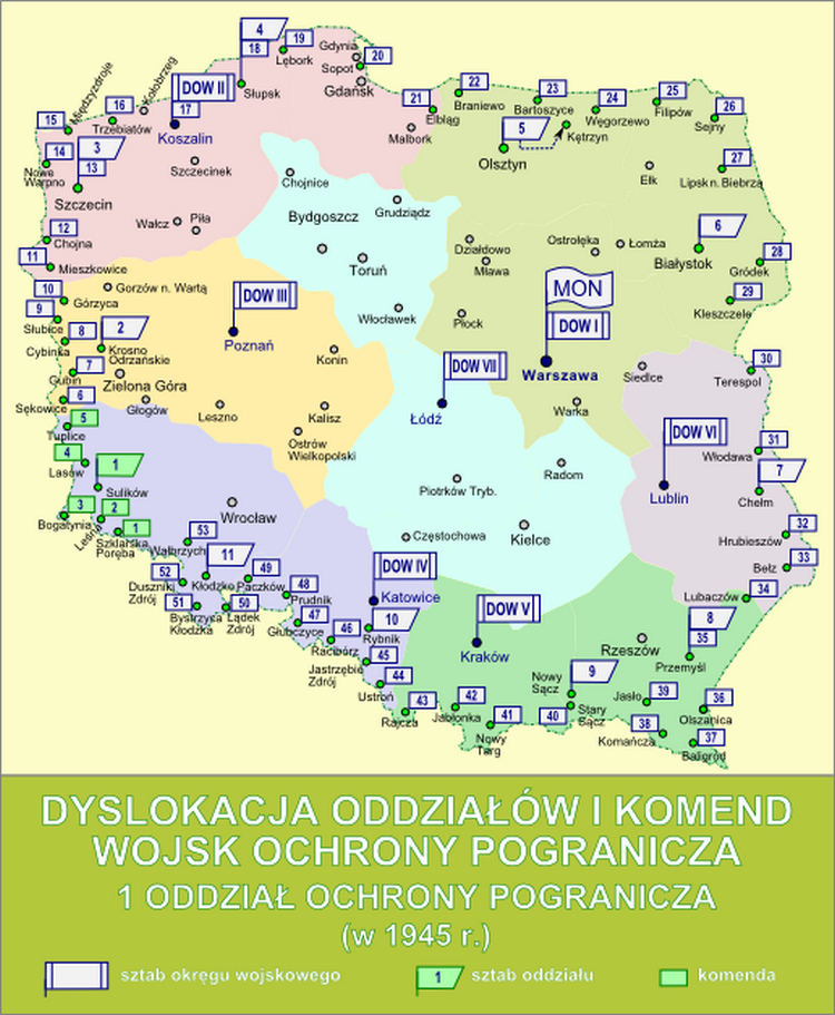 Dyslokacja oddziałów i komend Wojsk Ochrony Pogranicza - 1 Oddział Ochrony Pogranicza w 1945 r.